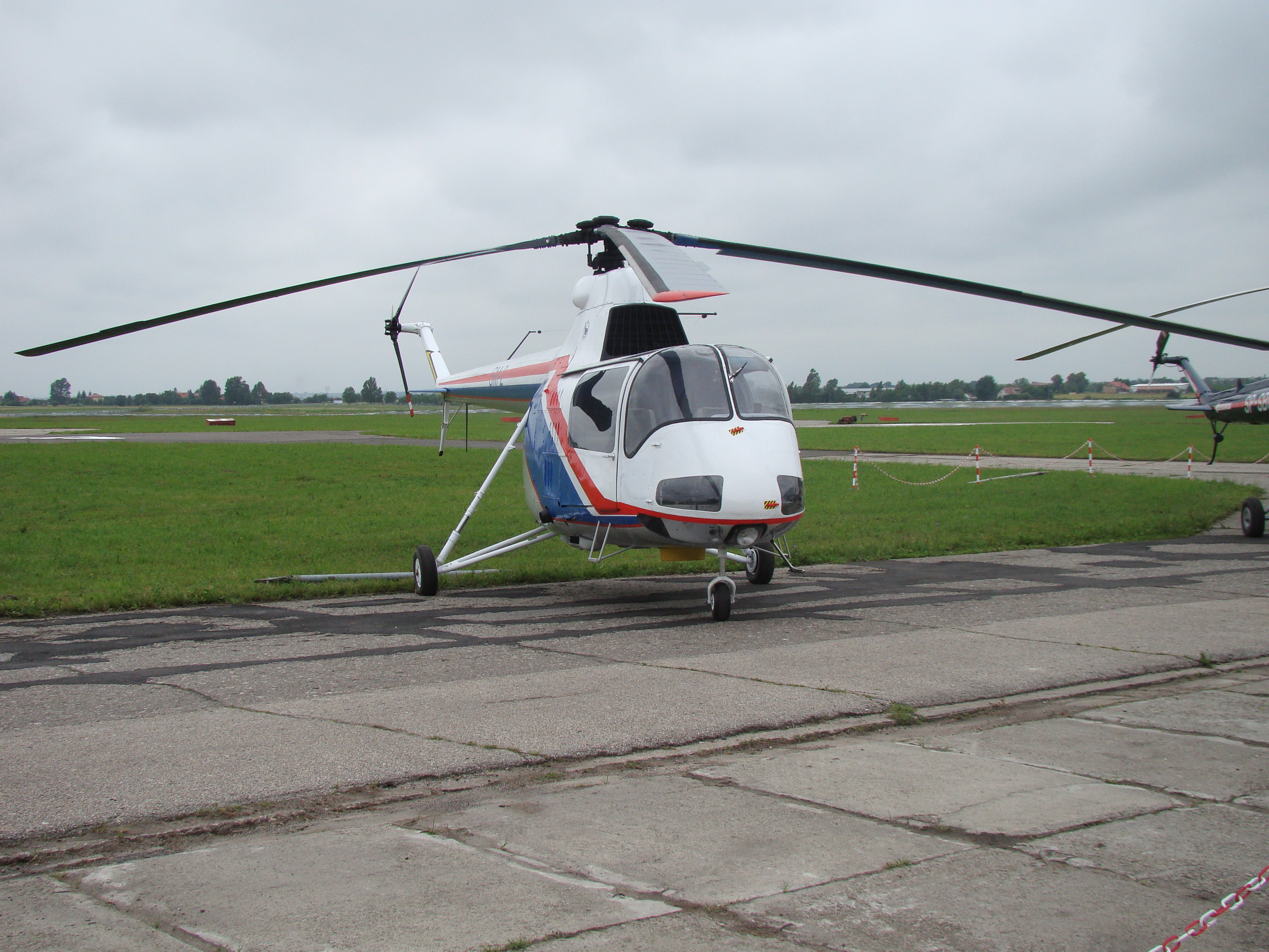 SM-2 w Świdniku